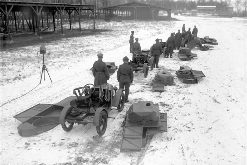 So hat Deutschland abgerüstet ! Die vom Ausland so gefürchteten deutschen Tanks, in Wirklichkeit Tankwagen-Attrappen, bei einer Geländeübung. Nach dem Versailler Vertrag sind Deutschland Tanks verboten. Um die Reichswehr im Kampf gegen Tankangriffe auszubilden, hat man in Deutschland Tankwagenattrappen, welche aus mit Blech verkleideten Autos bestehen. Die Tankwagen-Attrappen, bestehend aus mit Blech verkleideten Autos, werden von Reichswehrsoldaten abmontiert.